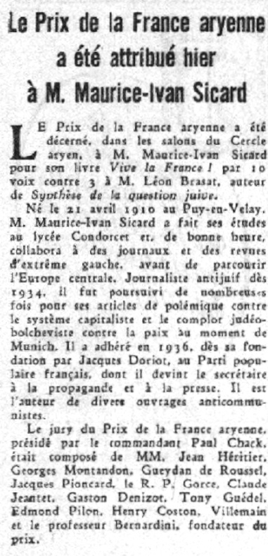 Maurcie-Ivan SIcard, prix de la France aryenne, mars 1944 ; article du Petit Parisien.